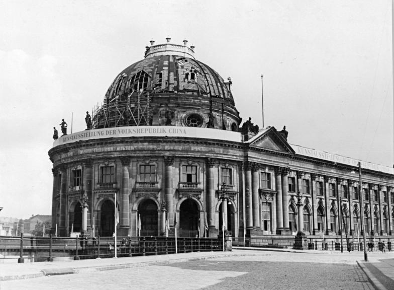 Berlin, Bodemuseum, Restaurierung Illus Rudolph Kno-Ho.6.6.51 Zum Monat der deutsch-chinesischen Freundschaft. Im ehemaligen Kaiser-Friedrich-Museum in Berlin wurde zum Monat der deutsch-chinesischen Freundschaft (Juni 51) eine Ausstellung mit chinesischen Kunstschätzen aus mehreren Jahrtausenden eröffnet. UBz: Blick auf das ehemalige Kaiser-Friedrich-Museum. [Berlin.- Bode-Museum]